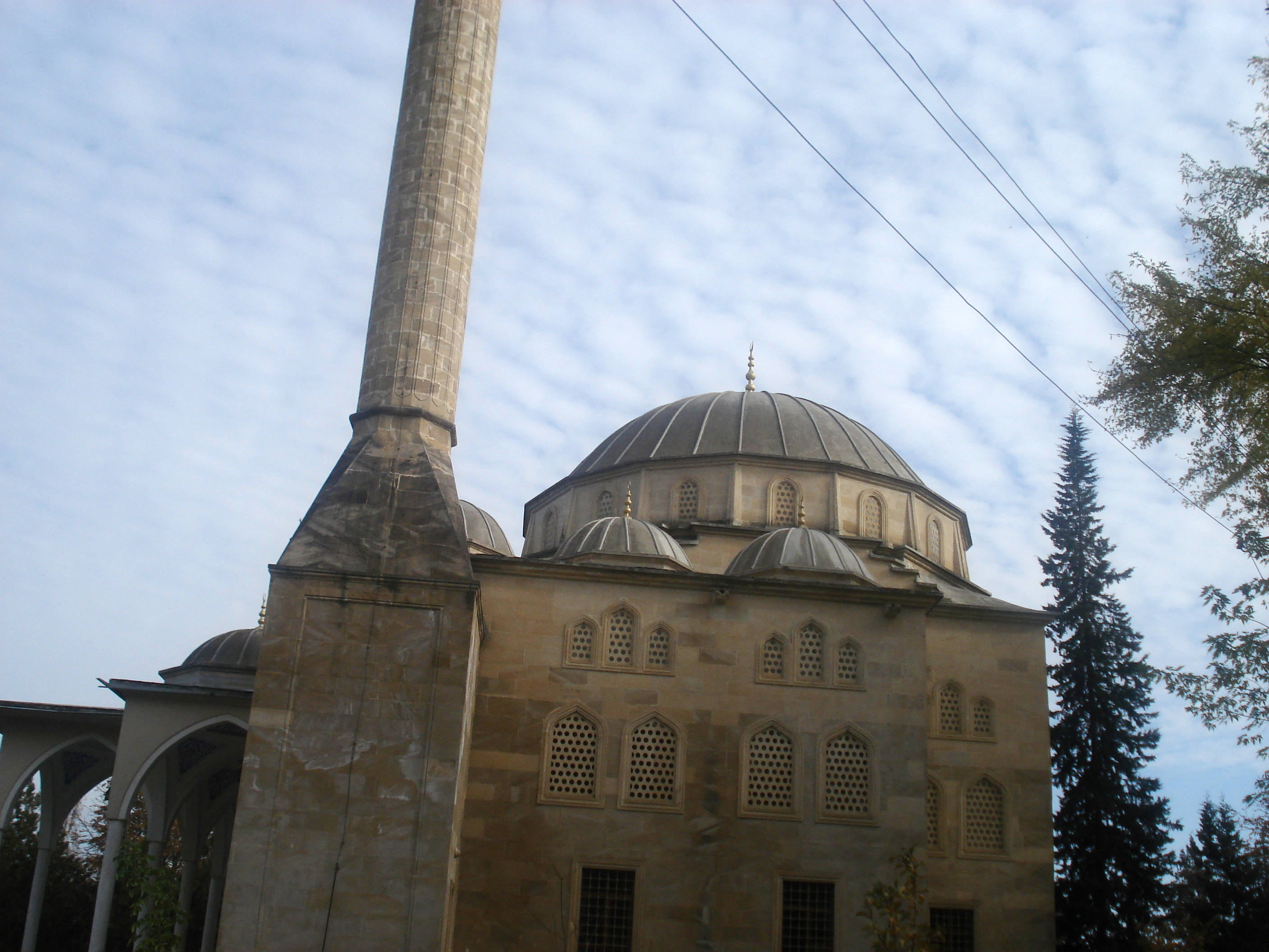 Мечеть в Кусарах